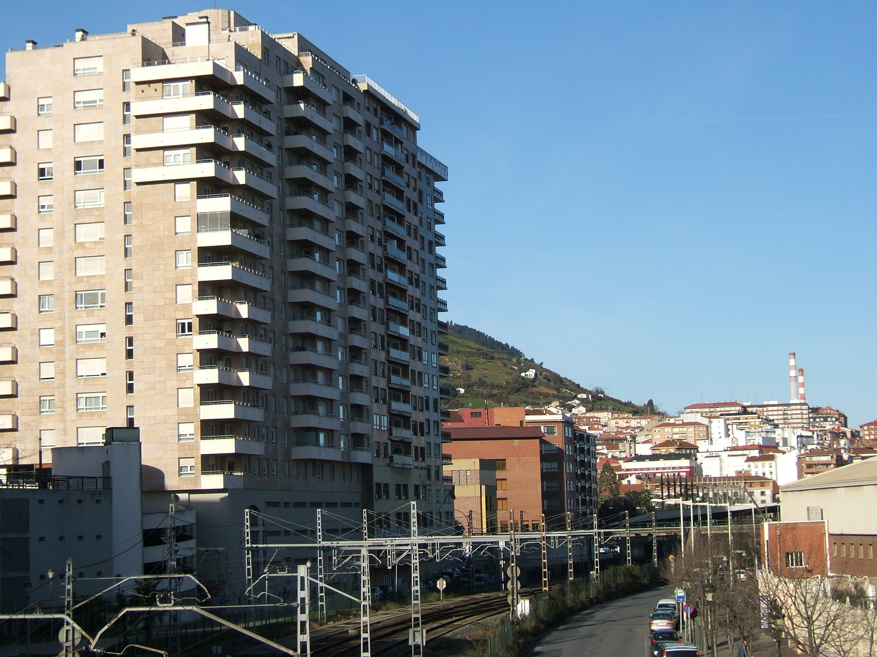 Santurtzi Behealdea, aurrez-aurre erdigunea eta eskuinean Polikiroldegia daudela / Parte baja de Santurtzi, de frente el centro y a la derecha el polideportivo